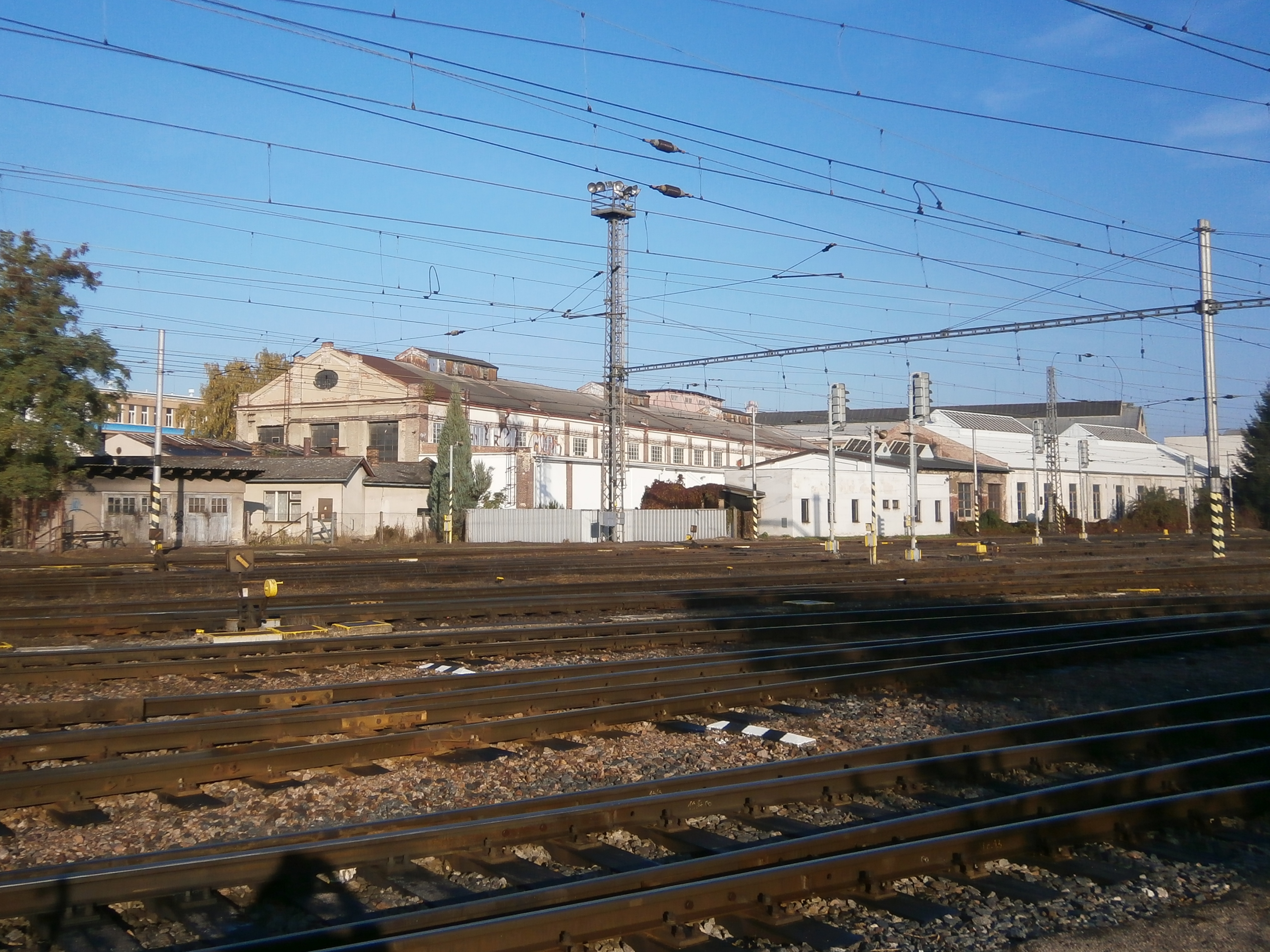 Areál ZVU, bývalých Závodů Vítězného února